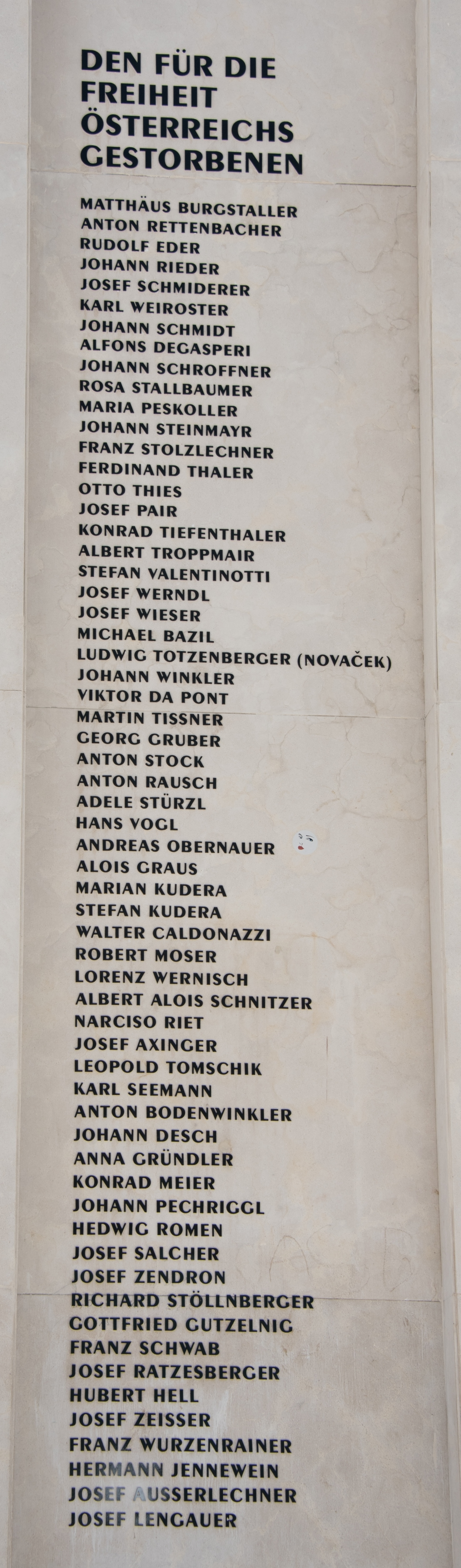 Befreiungsdenkmal Innsbruck